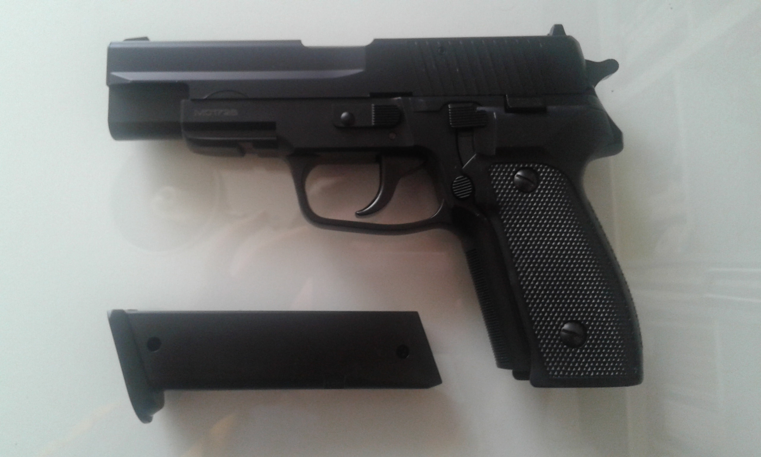 Réplica de una pistola para airsoft, con mecanismo de muelle.